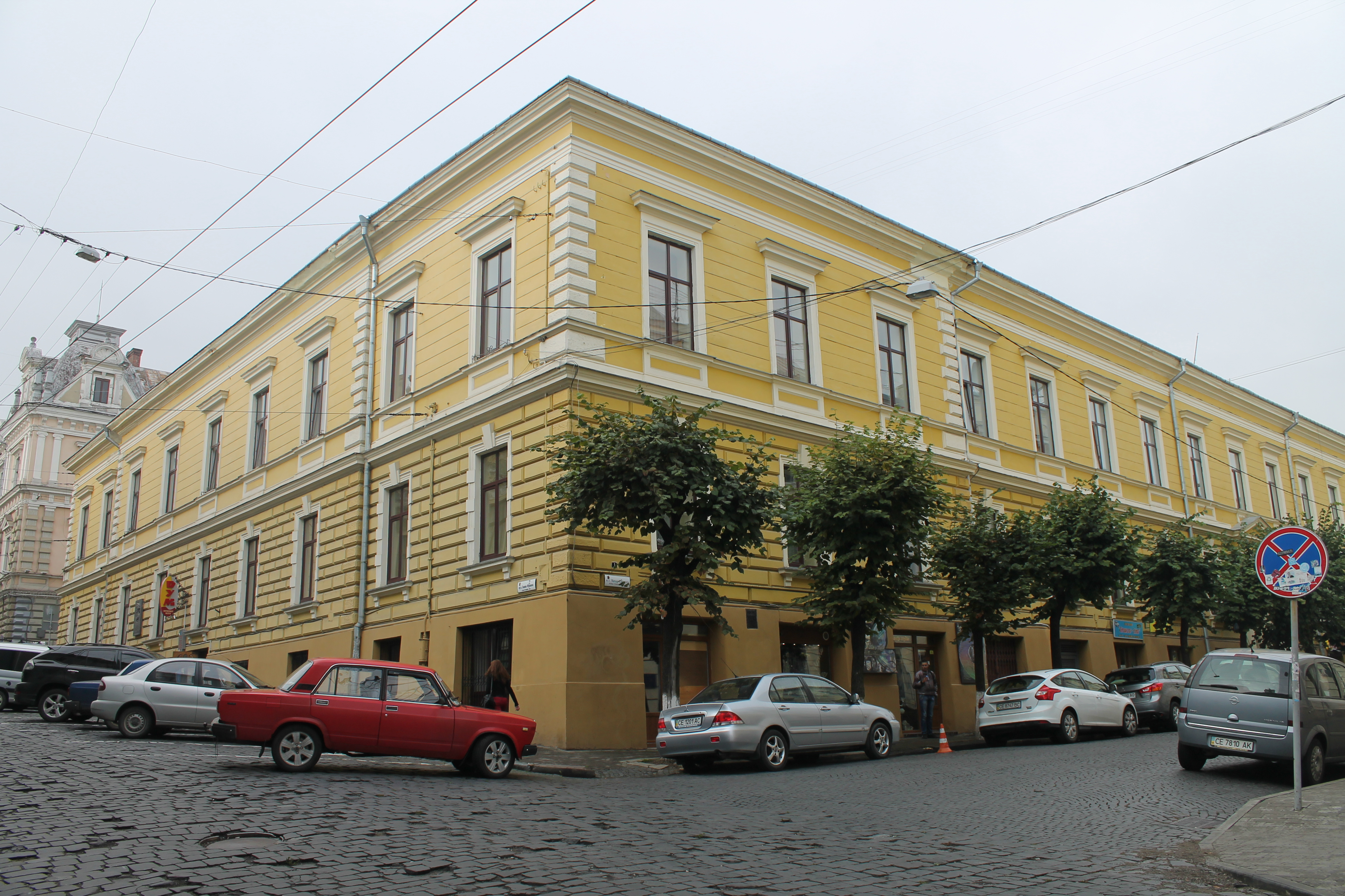 Будинок гімназії,де навчалися Емінеску М.-румунський поет та Штерн М.-діяч міжнародного робітничого руху, учасник громадянської війни в Іспанії., Чернівці, вул.Емінеску,1